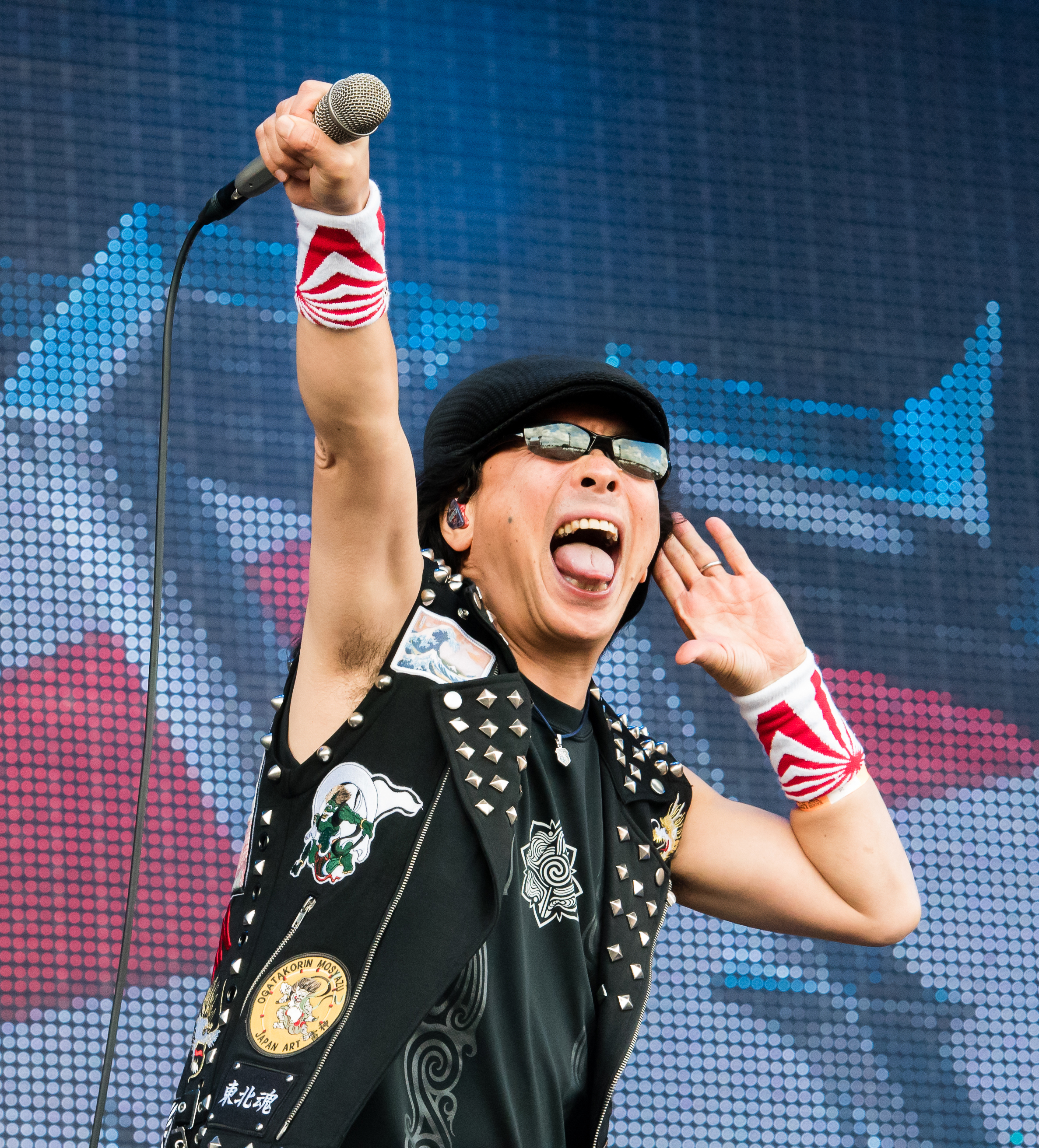 Loudness beim Wacken Open Air 2016